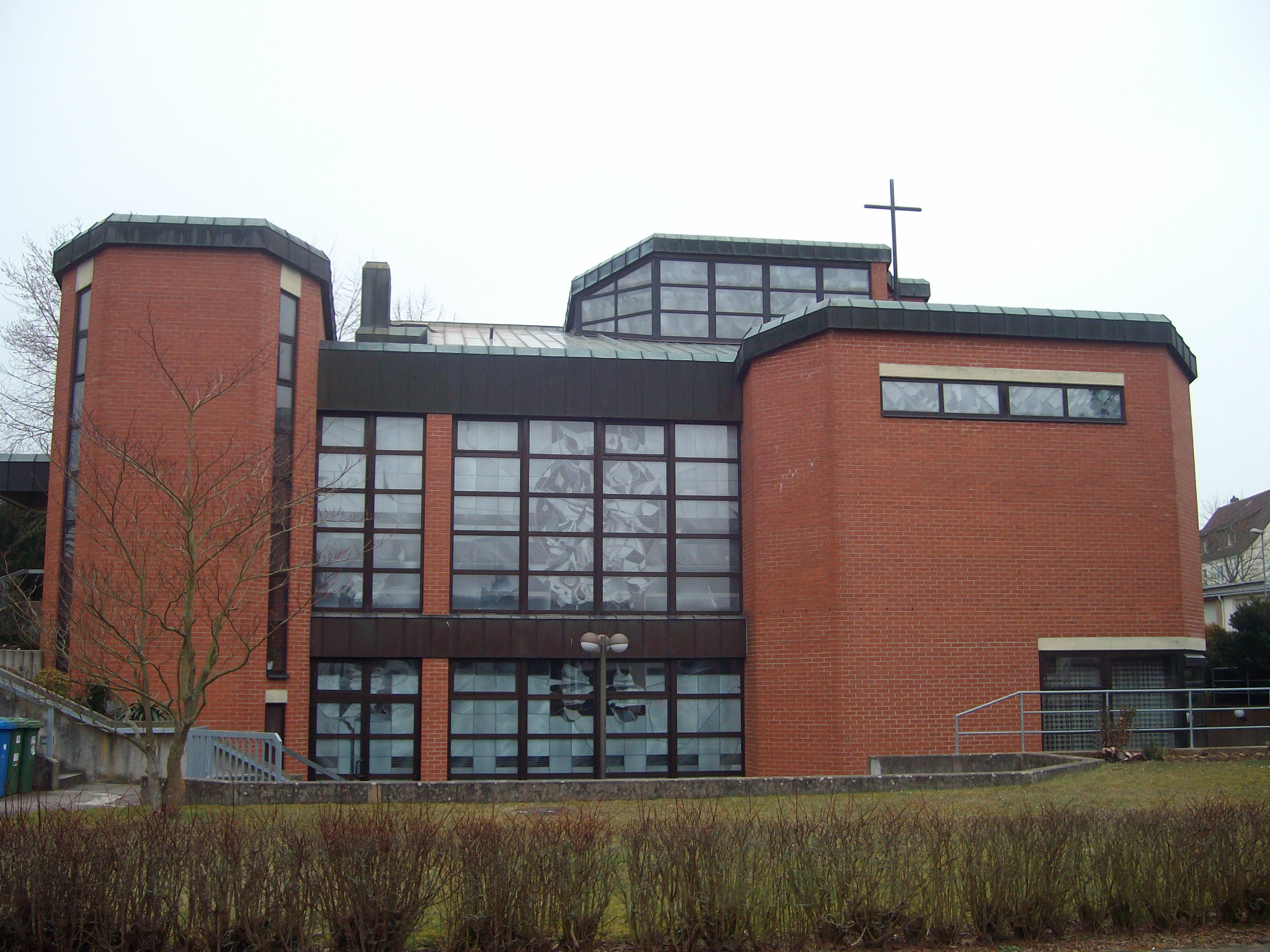 Maria Frieden in Heuchelheim, Landkreis Gießen, Hessen, Deutschland